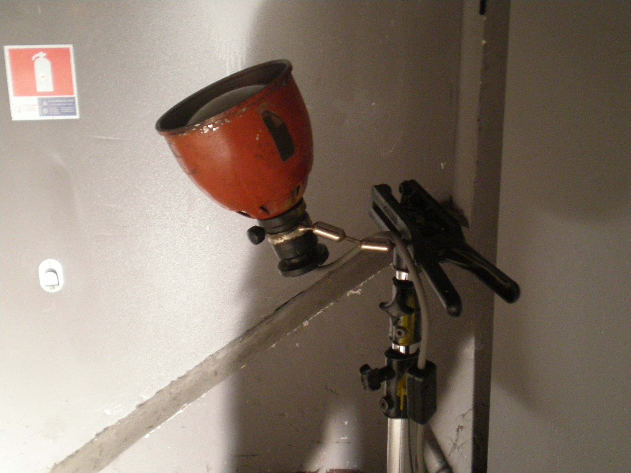 Projecteur de cinéma «Pince bol» à lampe tungstène d'une puissance de 500 W.